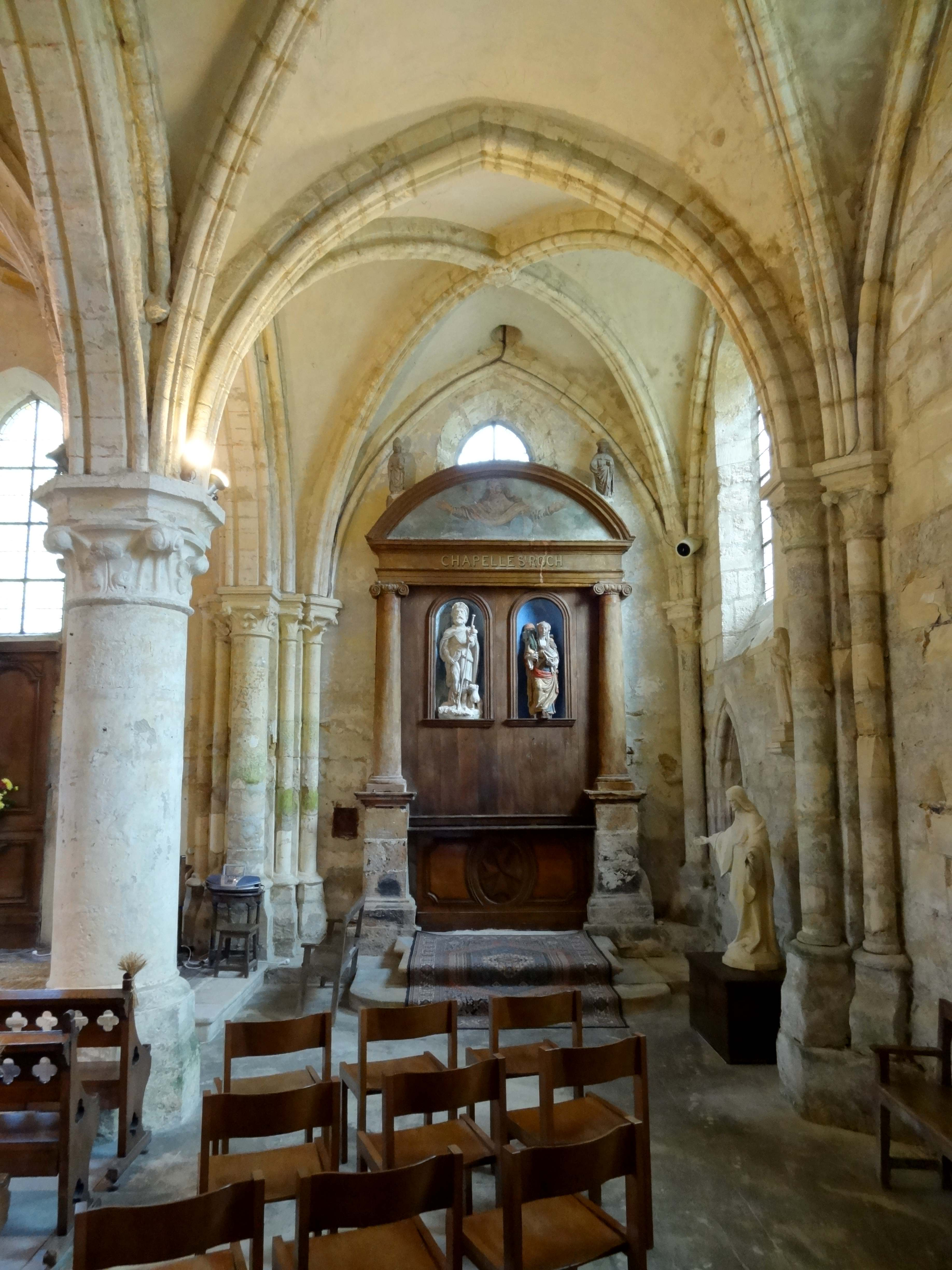 Intérieur de l'église - voir titre.